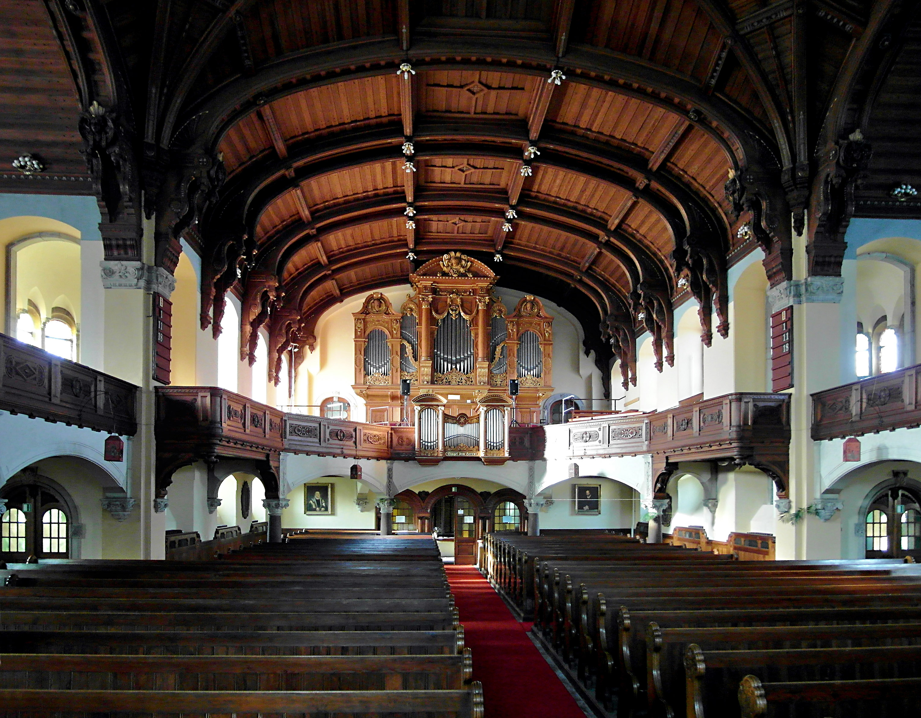 02.12.2012 01187 Dresden-Plauen, Reckestraße 6 (GMP: 51.028935,13.704658): Ev.-Luth. Auferstehungskirche. 700jährige Vorgeschichte mit vielen Umbauten. Früher hieß sie Michaeliskirche. Nach dem letzten großen Erweiterungsbau erhielt sie 1903 den Namen Auferstehungskirche. Architekten waren William Lossow und Hermann Viehweger. Einzigartige Eichenholzdecke. [SAM5219.JPG]20121202135DR.JPG(c)Blobelt